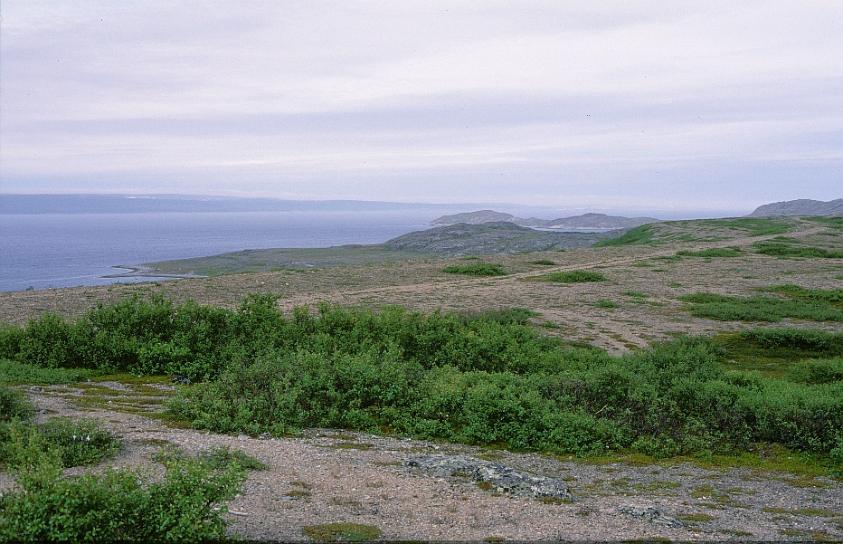 Varanginvuonon etelärantaa